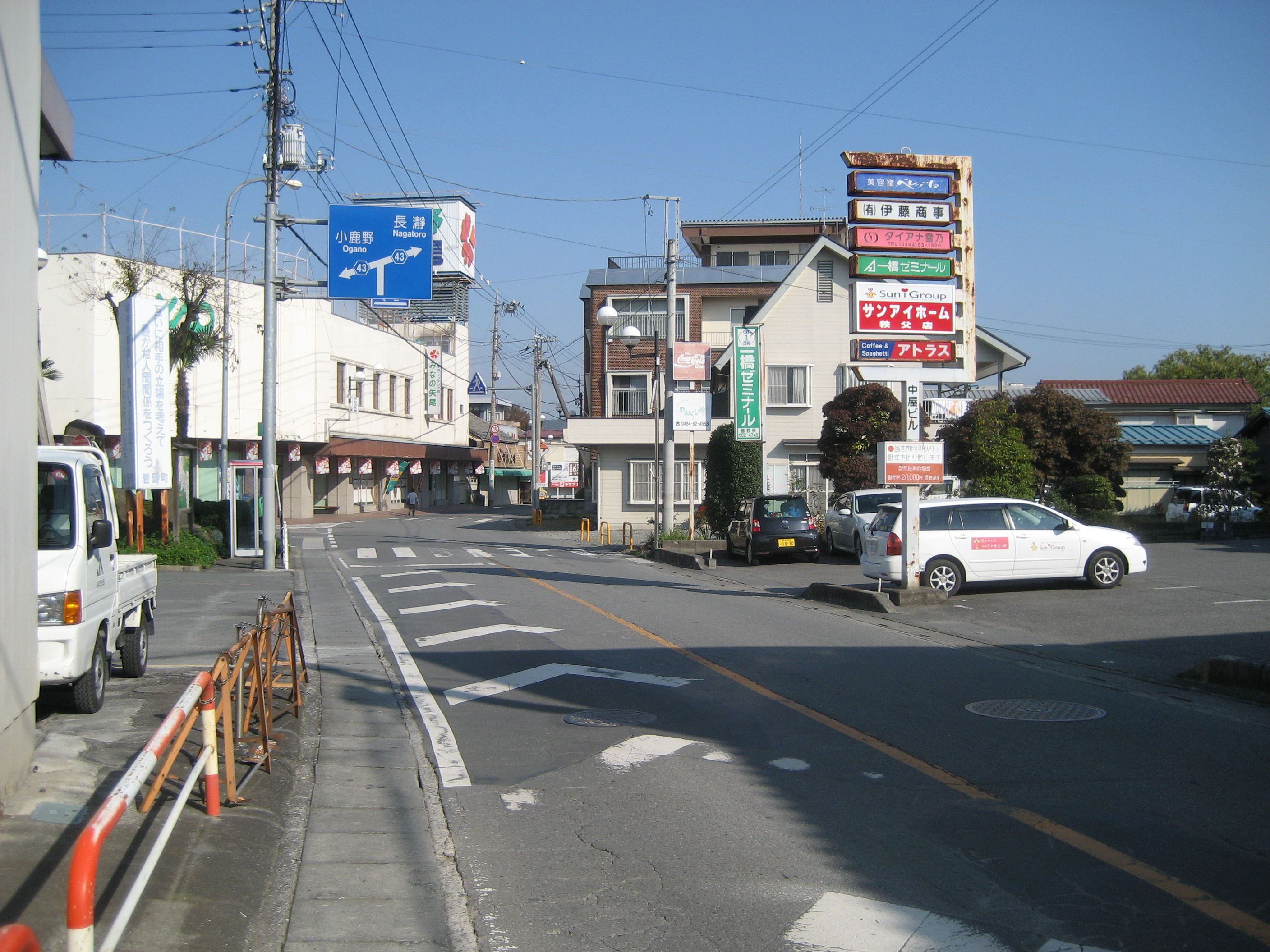 埼玉県道206号線皆野町皆野駅付近